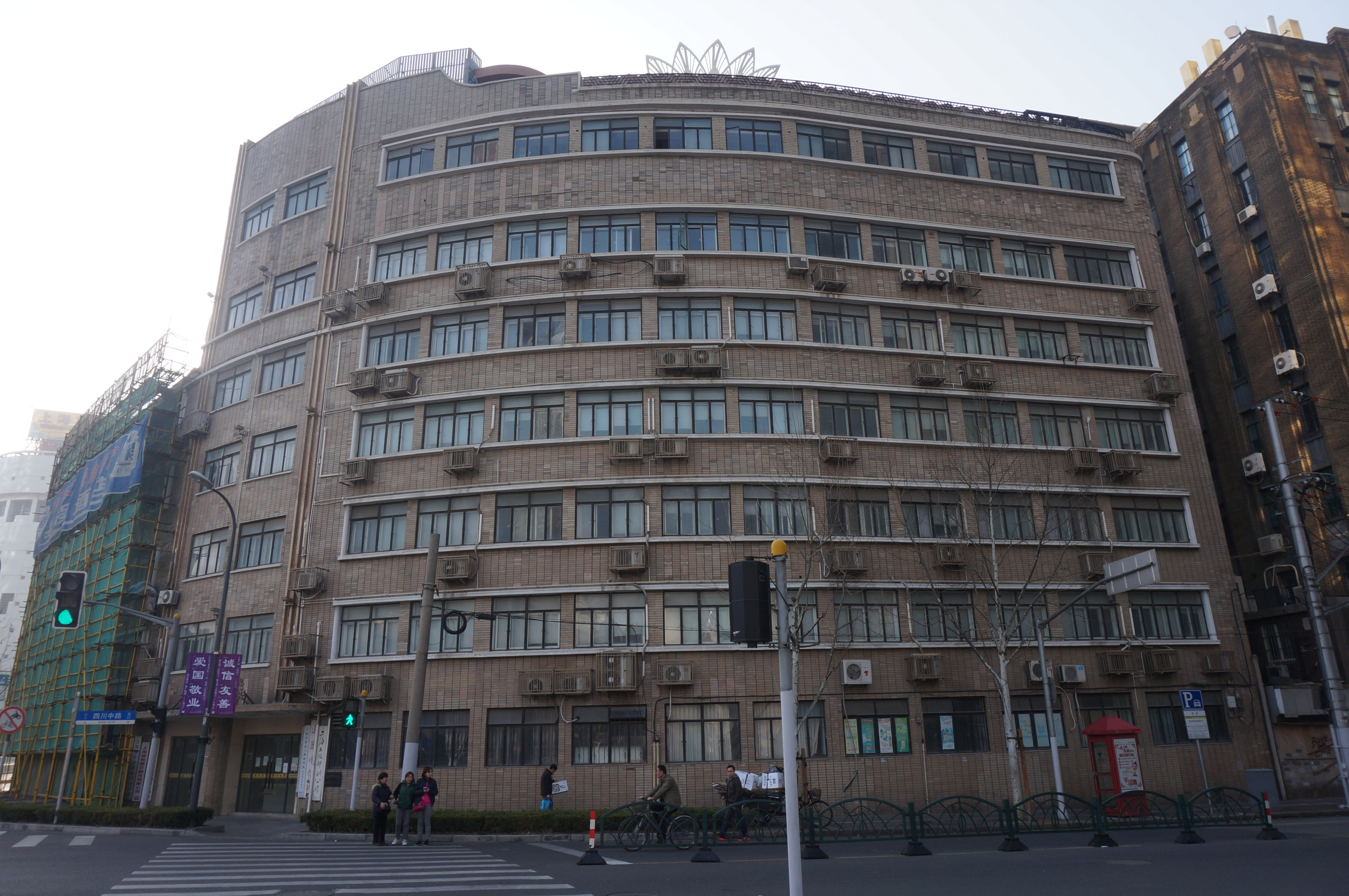 上海原德士古大楼